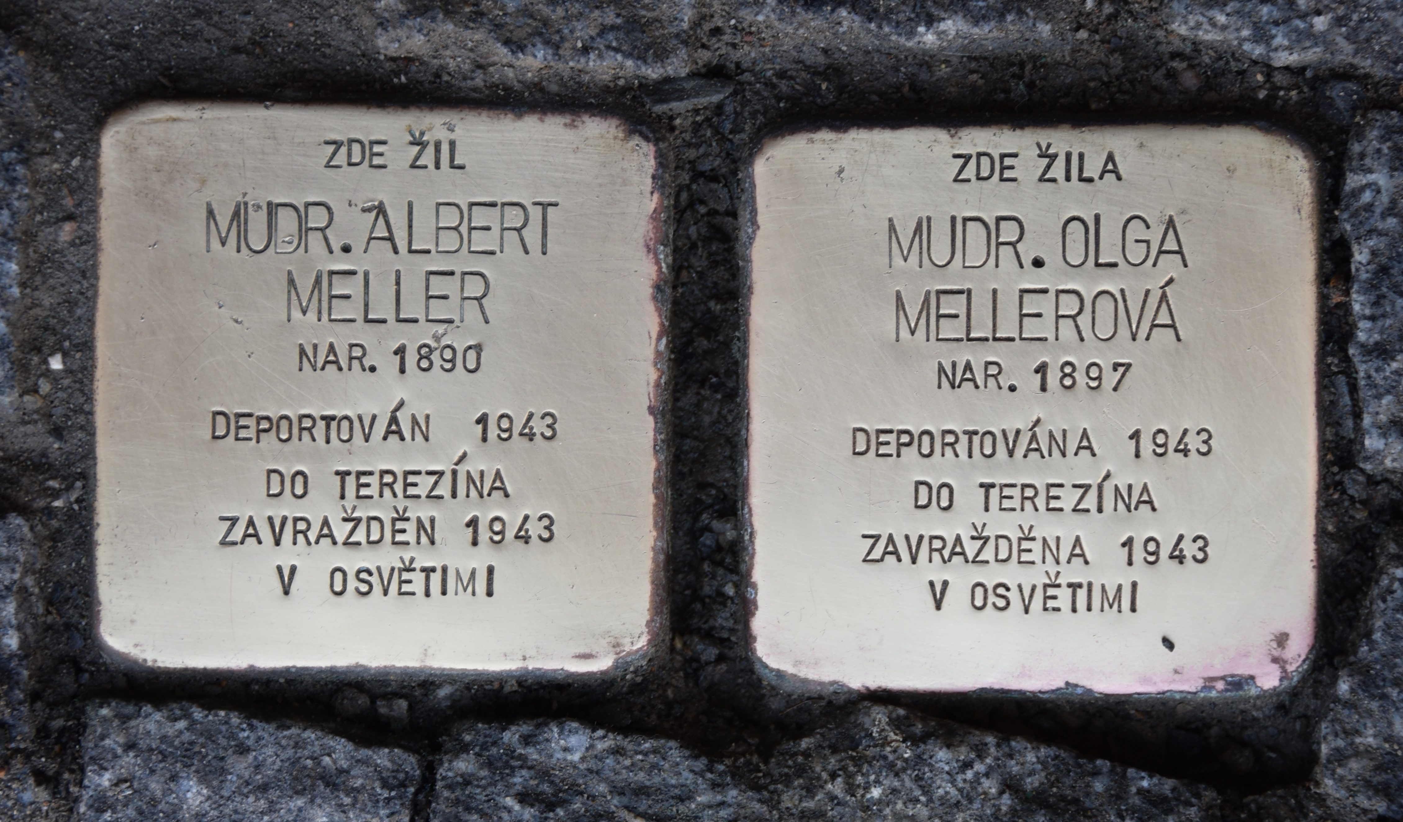 Stolpersteine für das Ehepaar Heller in Svitavy